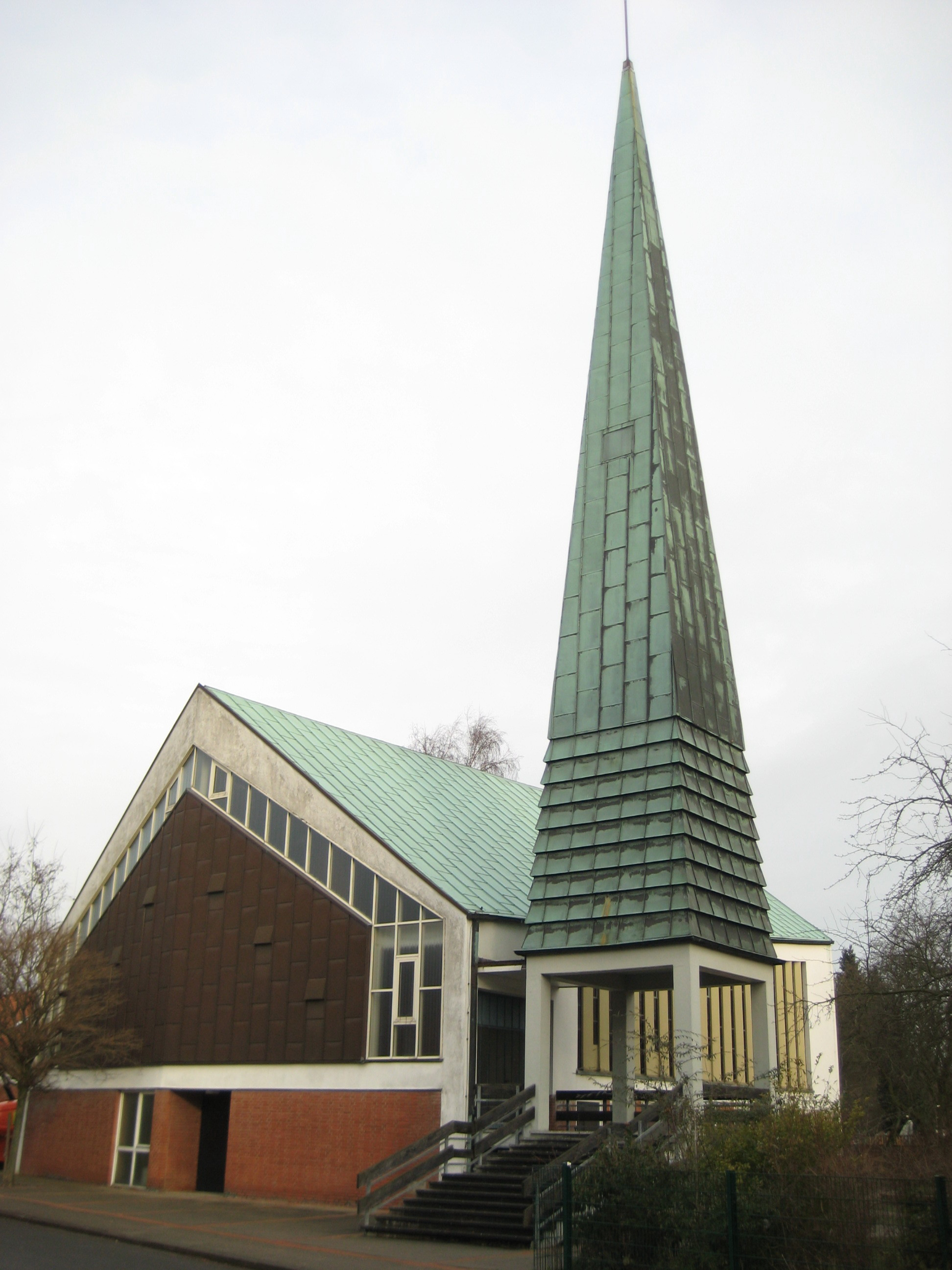 St. Lazarus, noch mit Turm